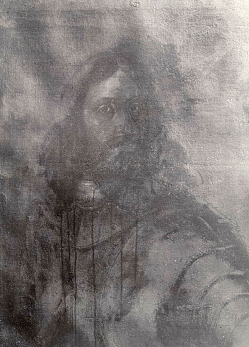 Georg Reichwein d.e., akvarell kopi, repro: Olsen Trondheim